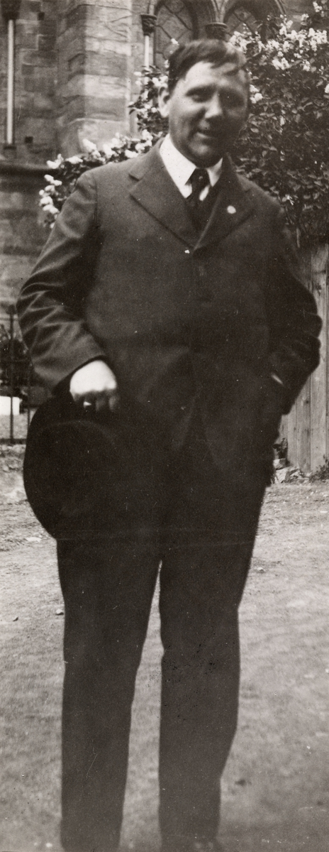 John Egil Tverdahl, fotografert ca. 1935–40 av ukjent fotograf. Fra Byhistorisk samling hos Oslo Museum.